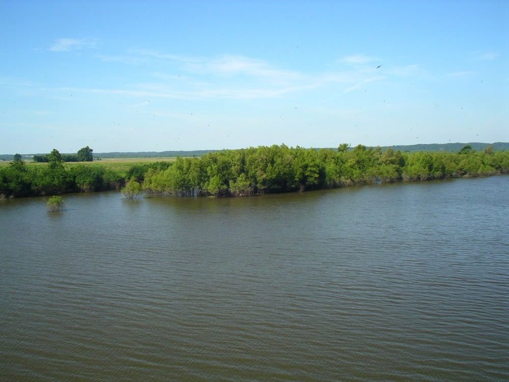 Der Big Muddy River wenige Kilometer vor der Mündung in den Mississippi